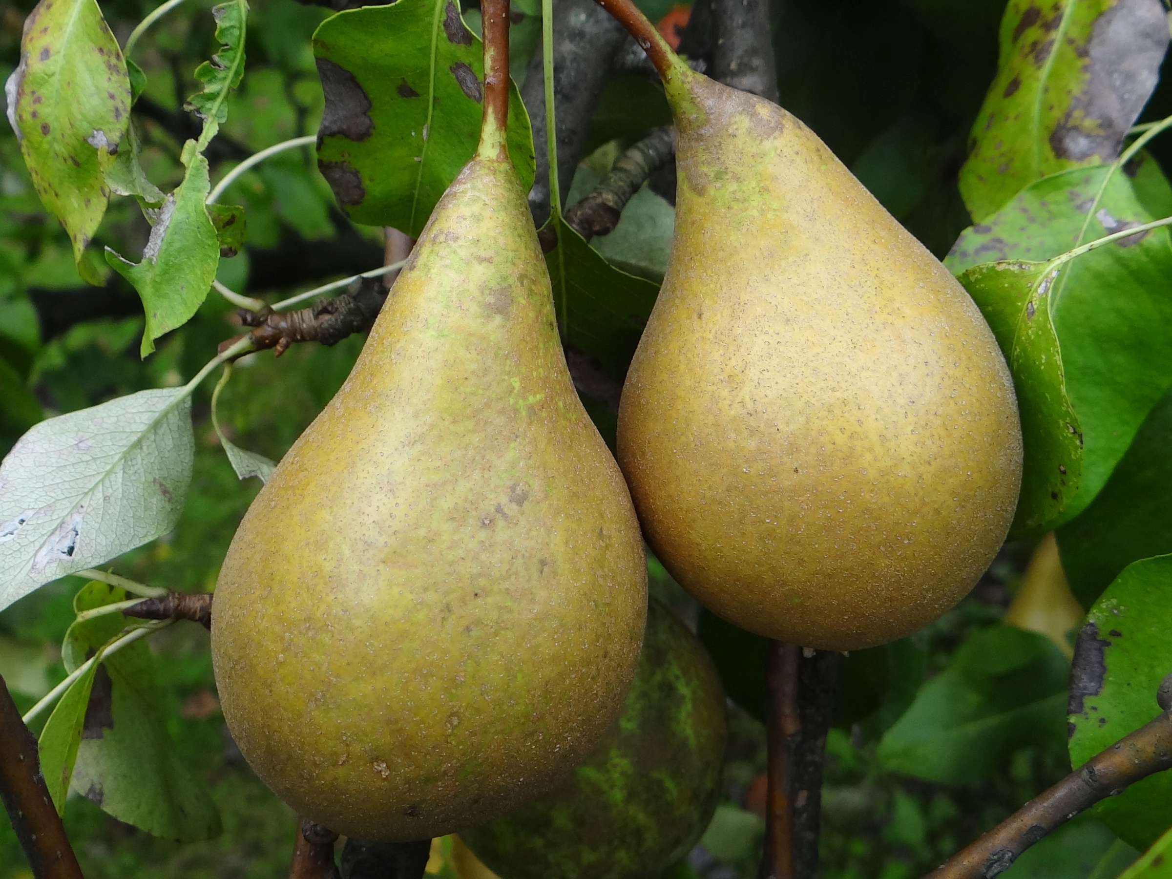 Gruszka 'Konferencja'